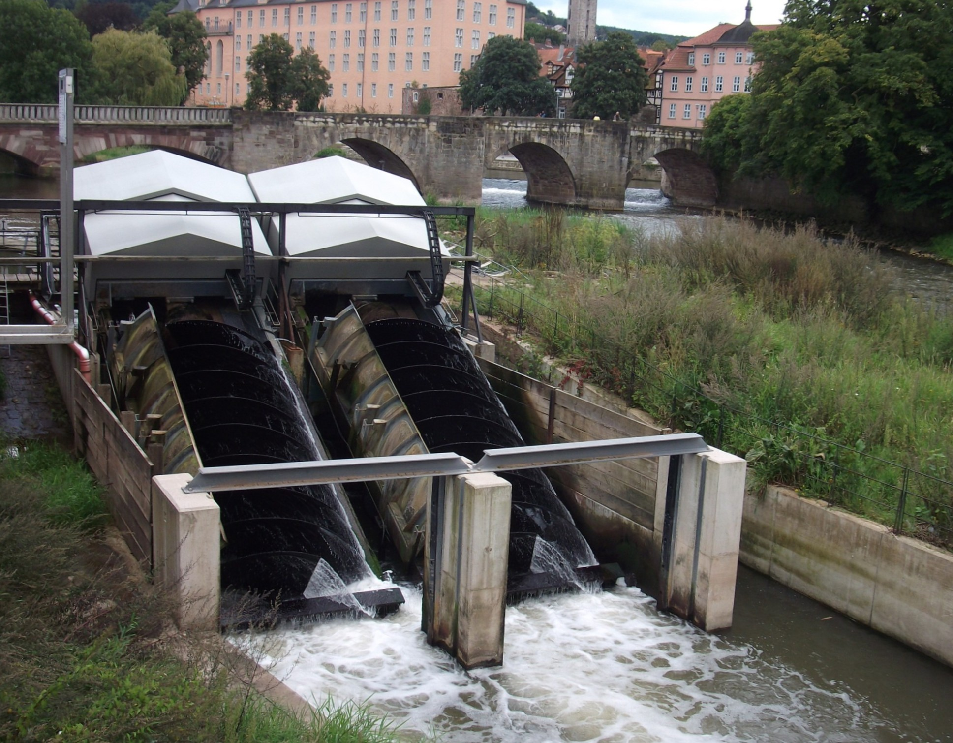 Standort: Hann. Münden in der Werra Jede der beiden Generatoren kann max. 70 kW abgeben, die max. Systemleistung beträgt 140 kW. Eine Leuchtziffernanzeige zeigt den aktuellen Wert - am 20.08.14 waren es 93 kW. Eine Schnecke hat 2,80 m Blattdurchmesser - bei einer Länge von 6 m. Die Fallhöhe beträgt 2,80 m. Als technische Besonderheit ist die Einstellbarkeit der Neigung zu nennen - abhängig vom hier stark schwankenden Unterwasserpegel. Im Bildhintergrund sind die Alte Werrabrücke und das Welfenschloss Münden zu sehen.